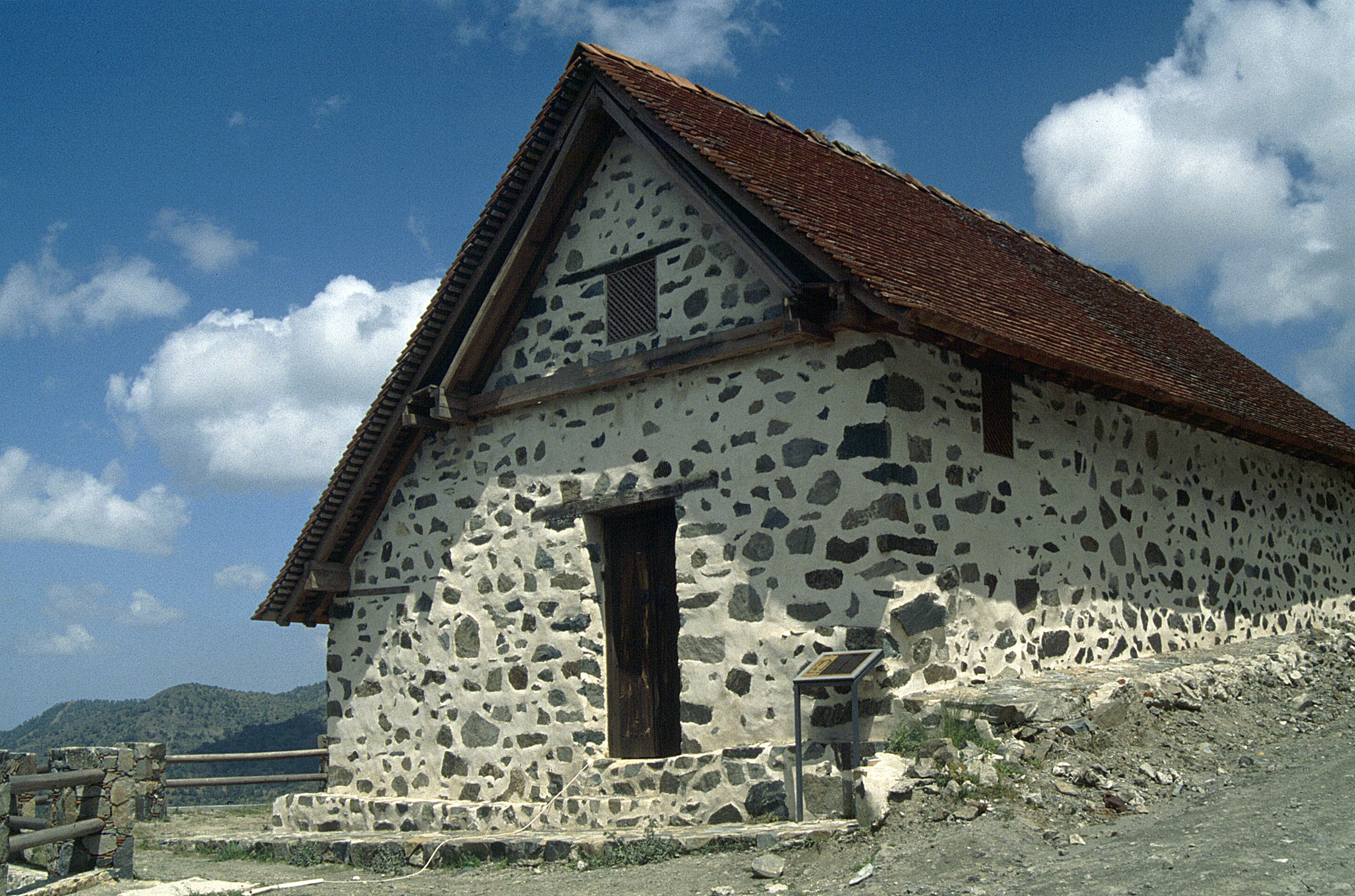 Panagia tis Moutoullas